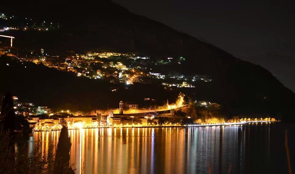 Riva di Solto by night